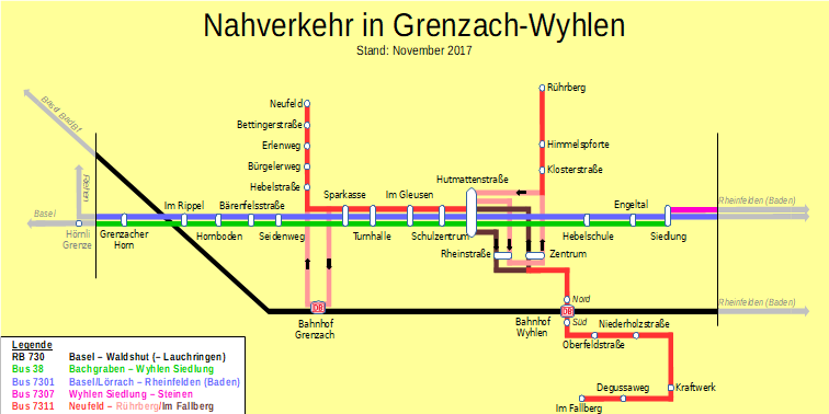 Die Grafik stellt das Liniennetz des öffentlichen Personennahverkehrs innerhalb der Gemeinde Grenzach-Wyhlen dar. Der Stand der Grafik ist November 2017.